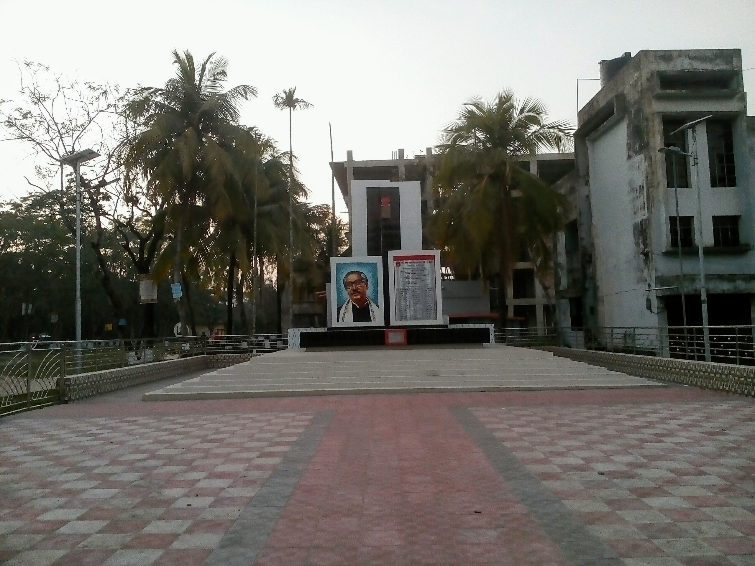 মুক্তিযুদ্ধের স্মৃতিচিহ্নস্বরূপ পাথরঘাটার উপজেলা পরিষদ মাঠে স্মৃতিসৌধ।